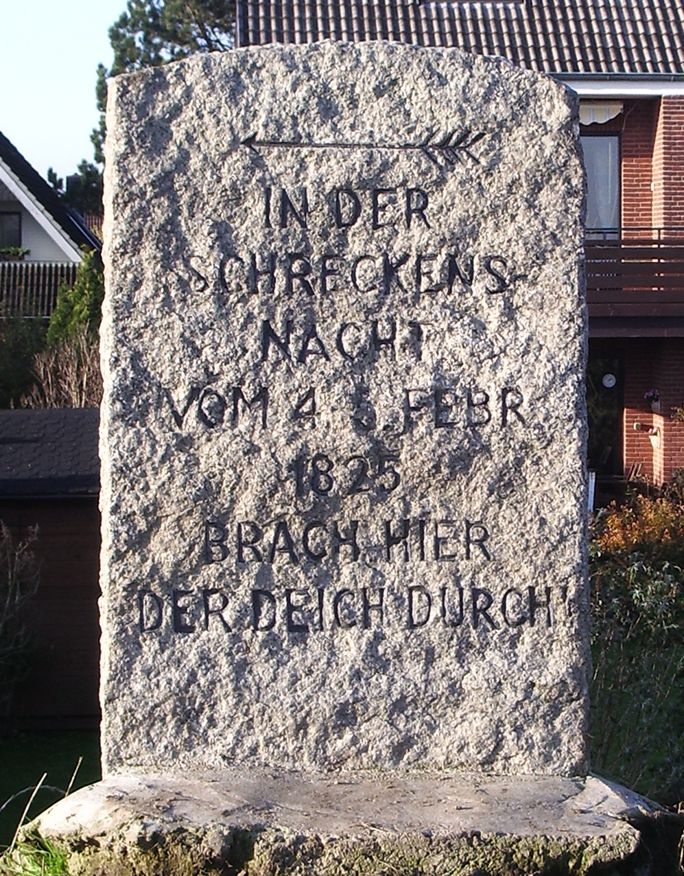 Gedenkstein an den Deichbruch in Hetlingen bei der Februarflut von 1825.